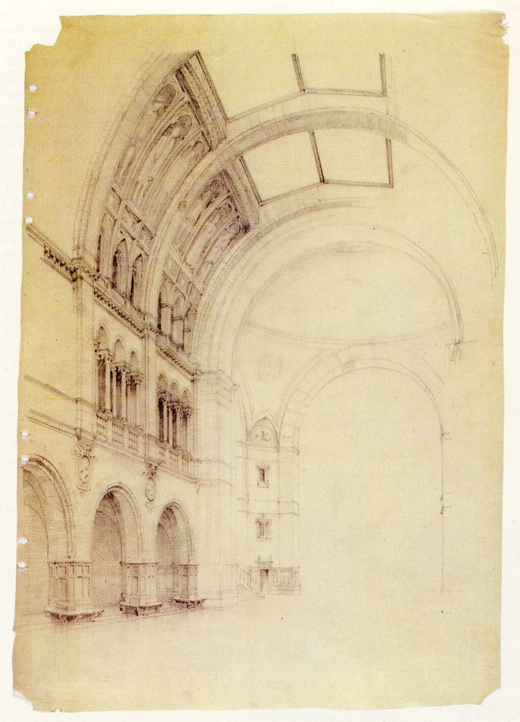 Originalskiss till Nordiska museet i Stockholm, centralhallen